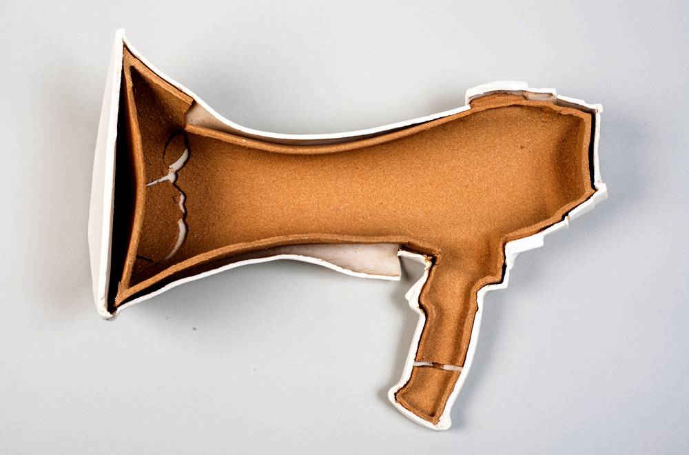 מתוך הפרויקט אזל. חומר קרמי מקומי בשילוב עם פורצלן